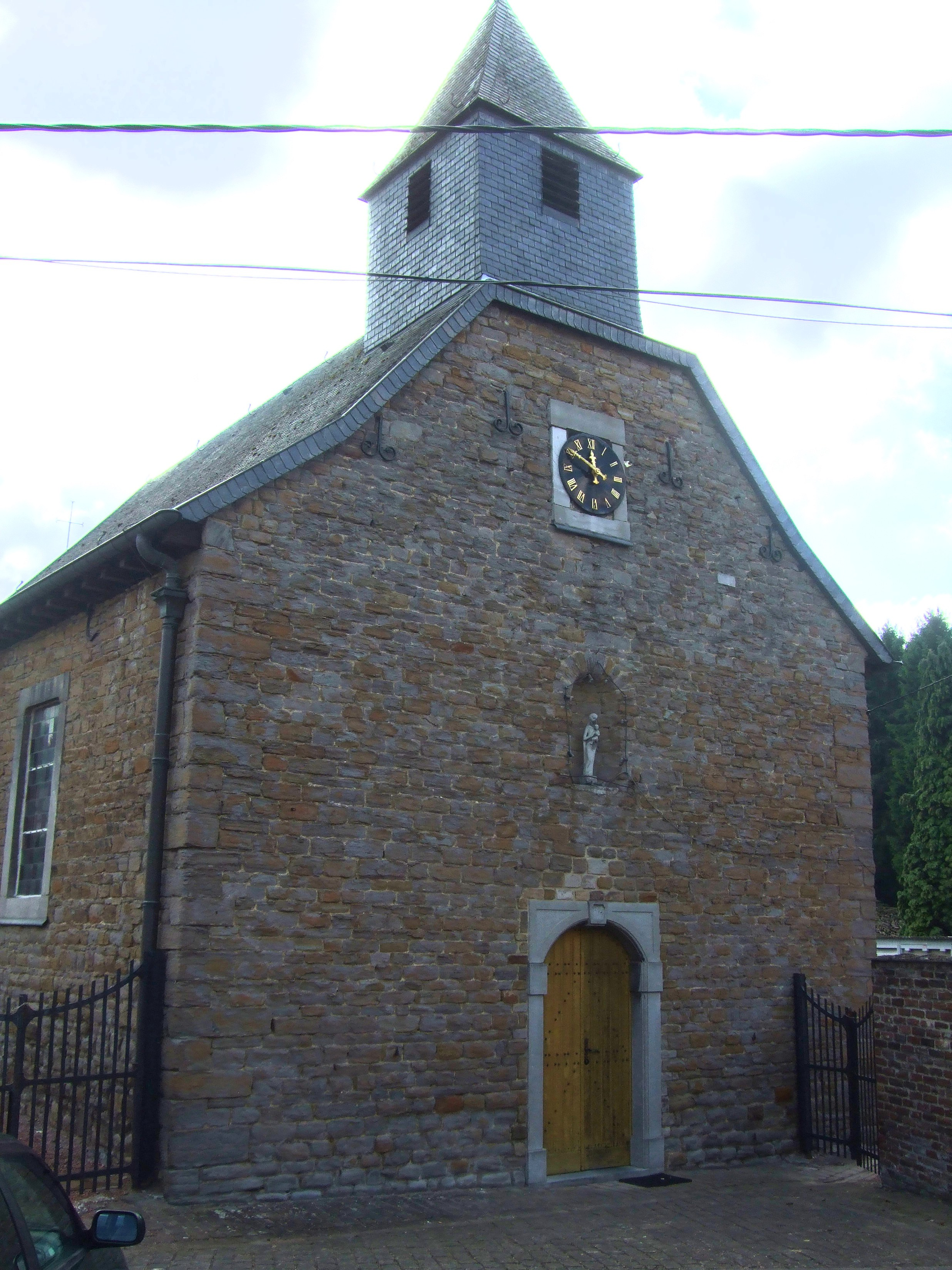 Eglise Saint-Nicolas à Souxhon (commune de Flémalle, dans la province de Liège, en Belgique).